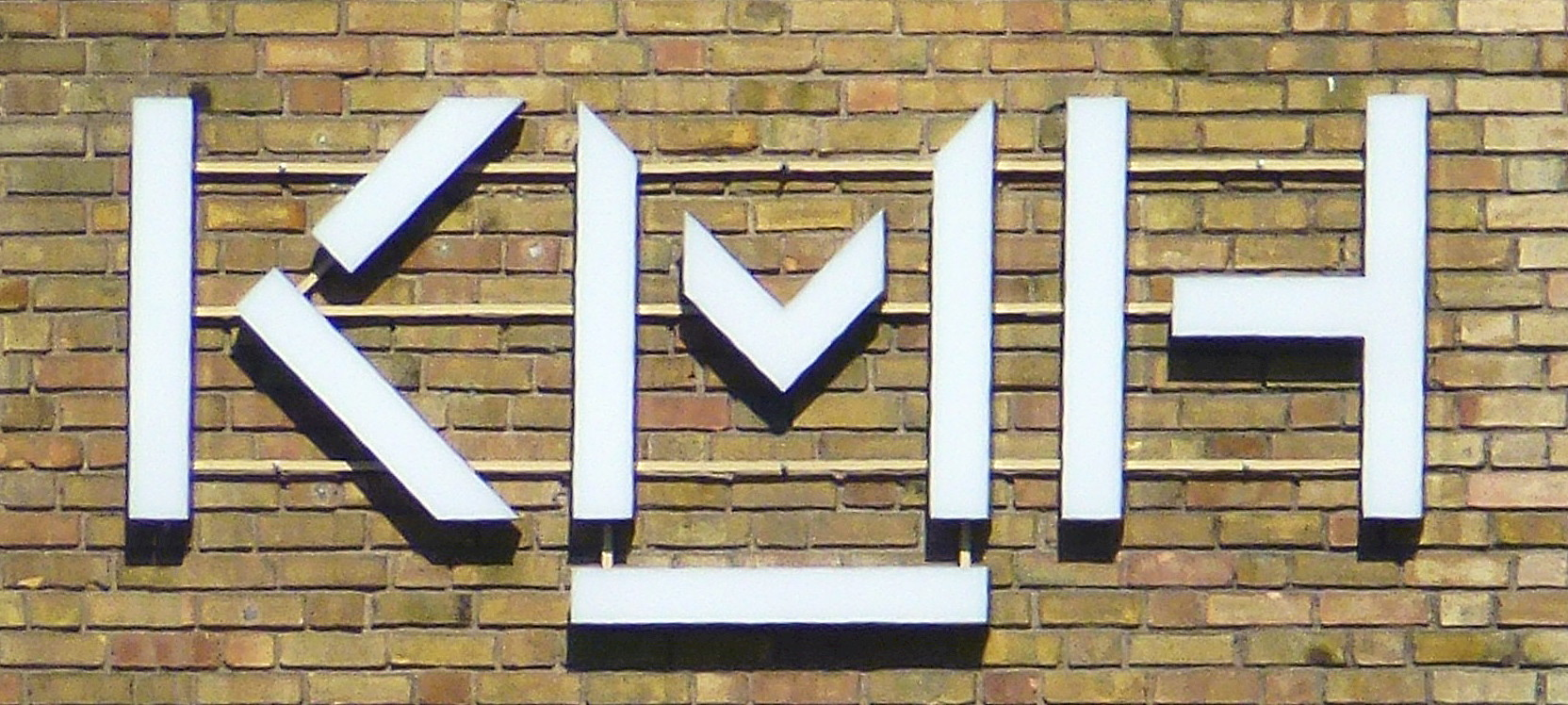 Kungliga Musikhögskolan i Stockholm, logo